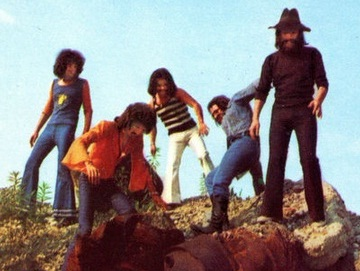 photo from Panini Cantanti '72 (1972)